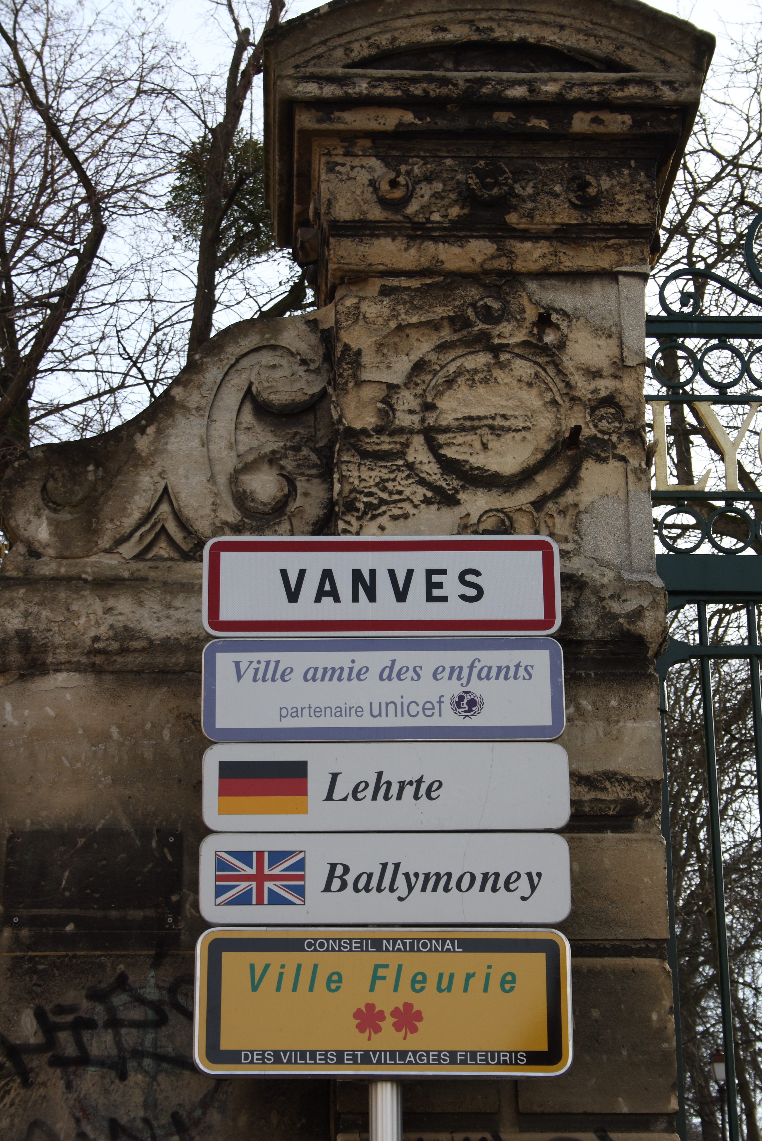 Ortsschild von Vanves im Département Hauts-de-Seine (Région Île-de-France), mit den Schildern der Partnerstädte Ballymoney und Lehrte